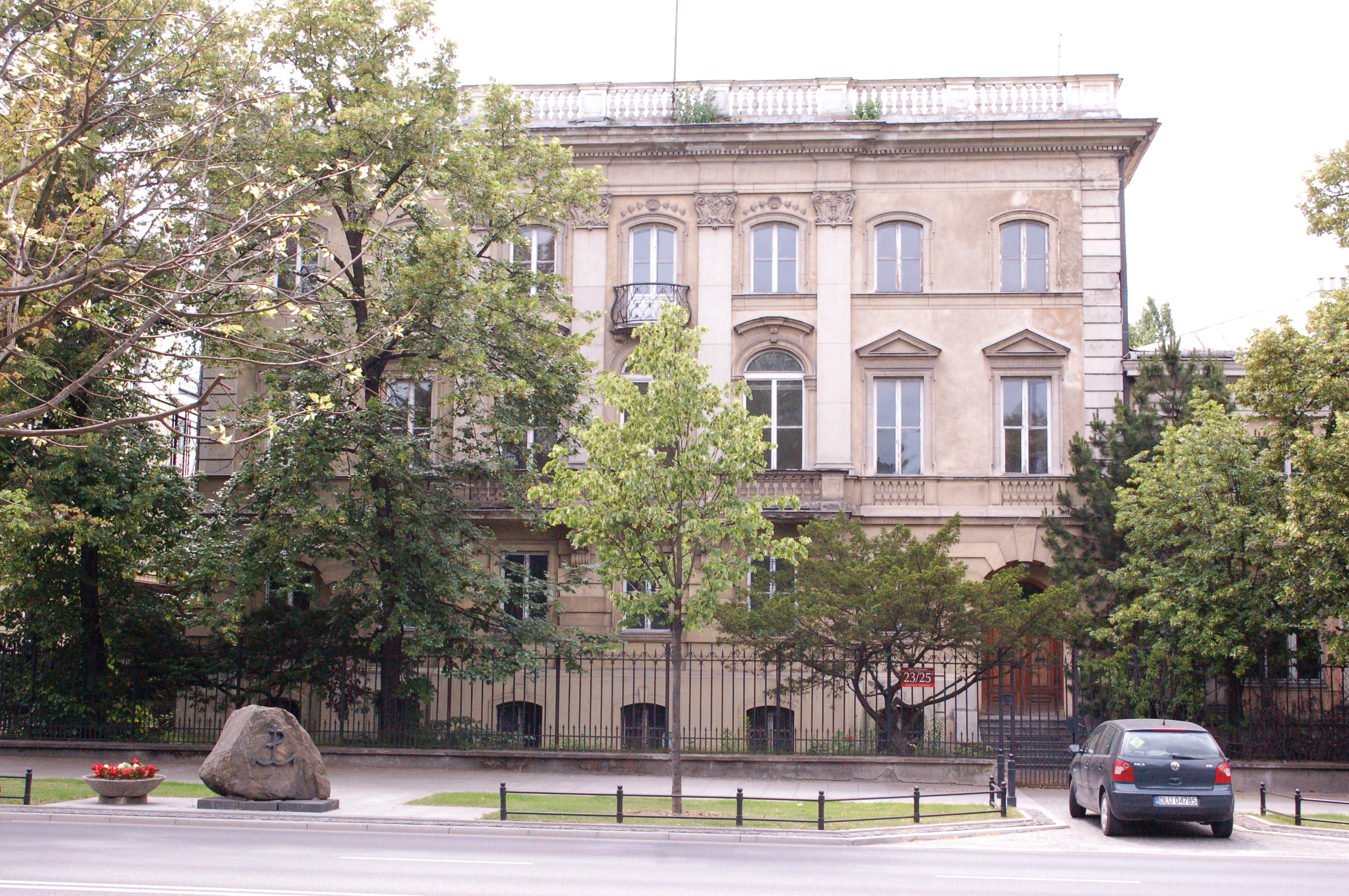 Warschau, Al. Ujazdowskie 23/25